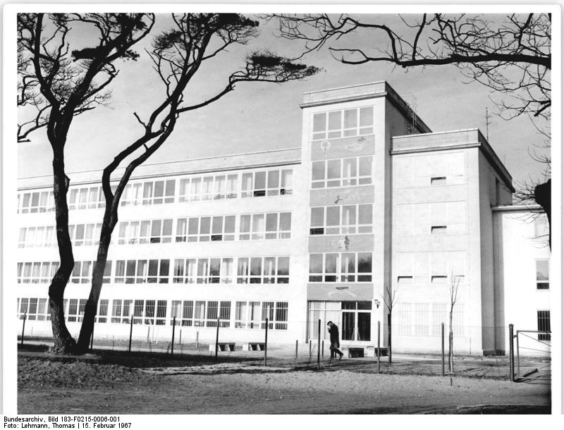 Warnemünde, Institut für Meereskunde Zentralbild Lehmann 15.2.1967 Rostock: Institut für Meereskunde Warnemünde der Deutschen Akademie der Wissenschaften zu Berlin-Zentrum der ozeanologischen Forschung der DDR In diesem neuen Gebäude - im Jahre 1965 erbaut - ist das Institut für Meereskunde in Warnemünde untergebracht. Seit 1960 besteht das Institut als Zentrum der ozeanologischen Forschung und Untersuchung. In den Forschungsgruppen und Laboratorien werden Forschungen der Naturvorgänge im Meer durchgeführt. Hierzu zählen der physikalisch-chemische Aufbau des Meeres, die Erarbeitung für Vorhersagen meereskundlicher Prozesse sowie erdmagnetische Untersuchungen. Diese Forschungen haben für die wirtschaftliche Ausnutzung des Meeres große Bedeutung. Das Institut steht mit 182 wissenschaftlichen Partnerinstituten aus aller Welt in enger Verbindung. Die Mitarbeiter des Institutes beteiligen sich an großen internationalen Expeditionen.